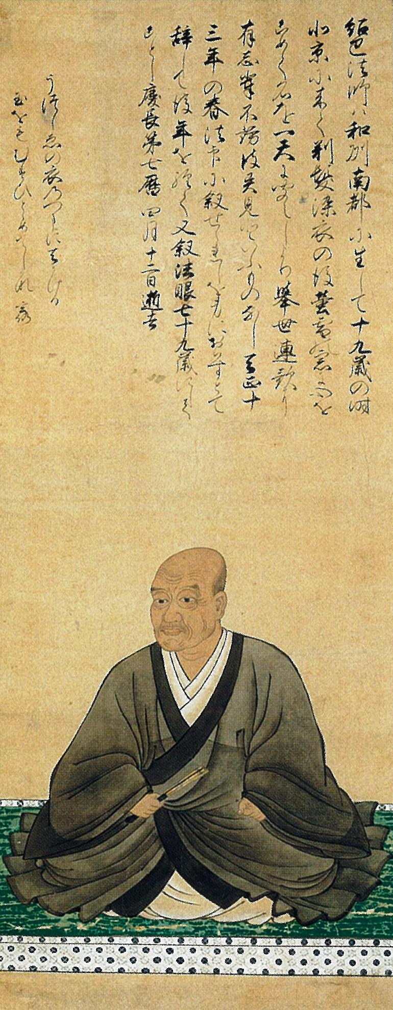 戦国時代・安土桃山時代の連歌師・里村紹巴（1525 - 1602）の肖像画。18世紀の作品